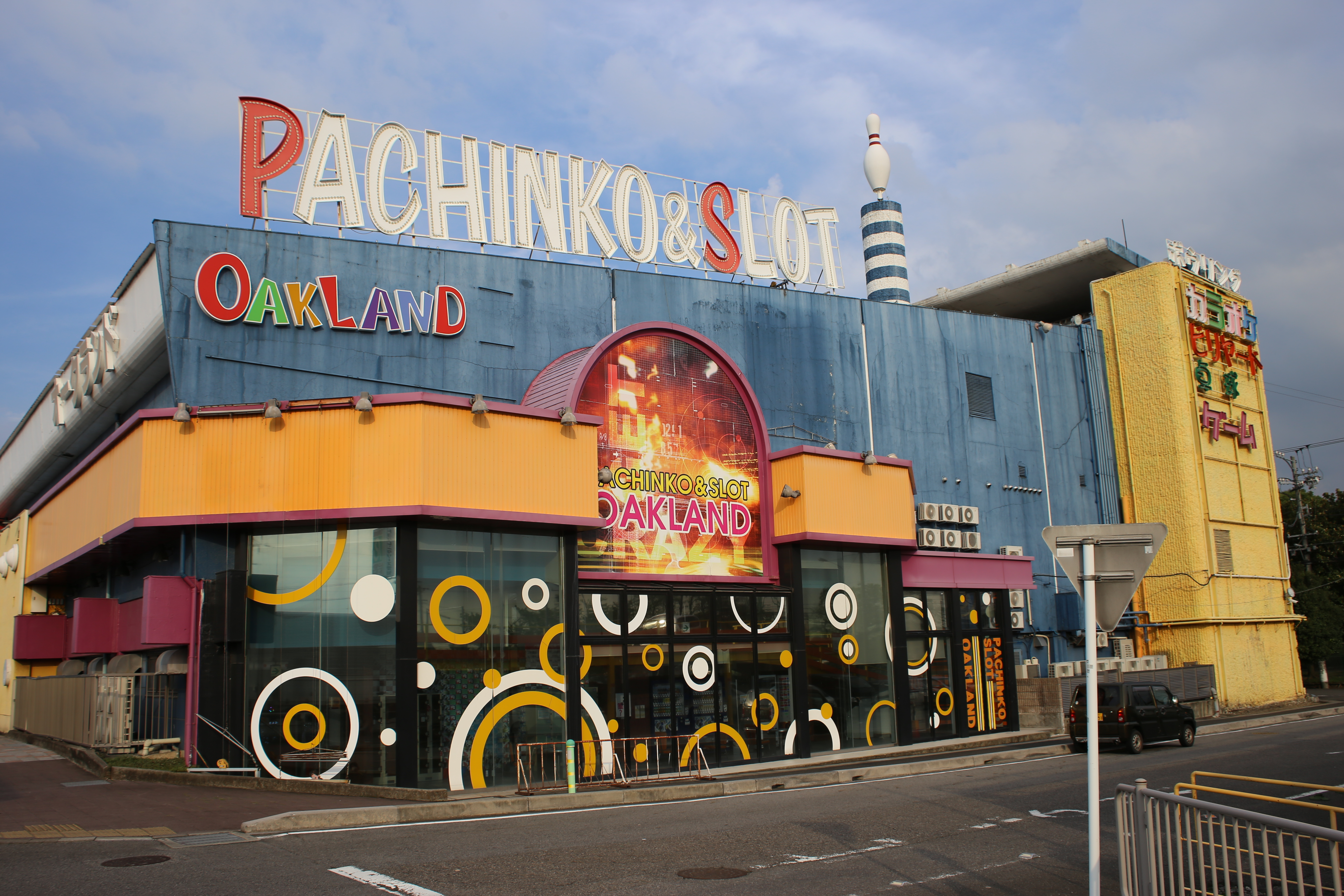 愛知県春日井市鳥居松町のオークランド